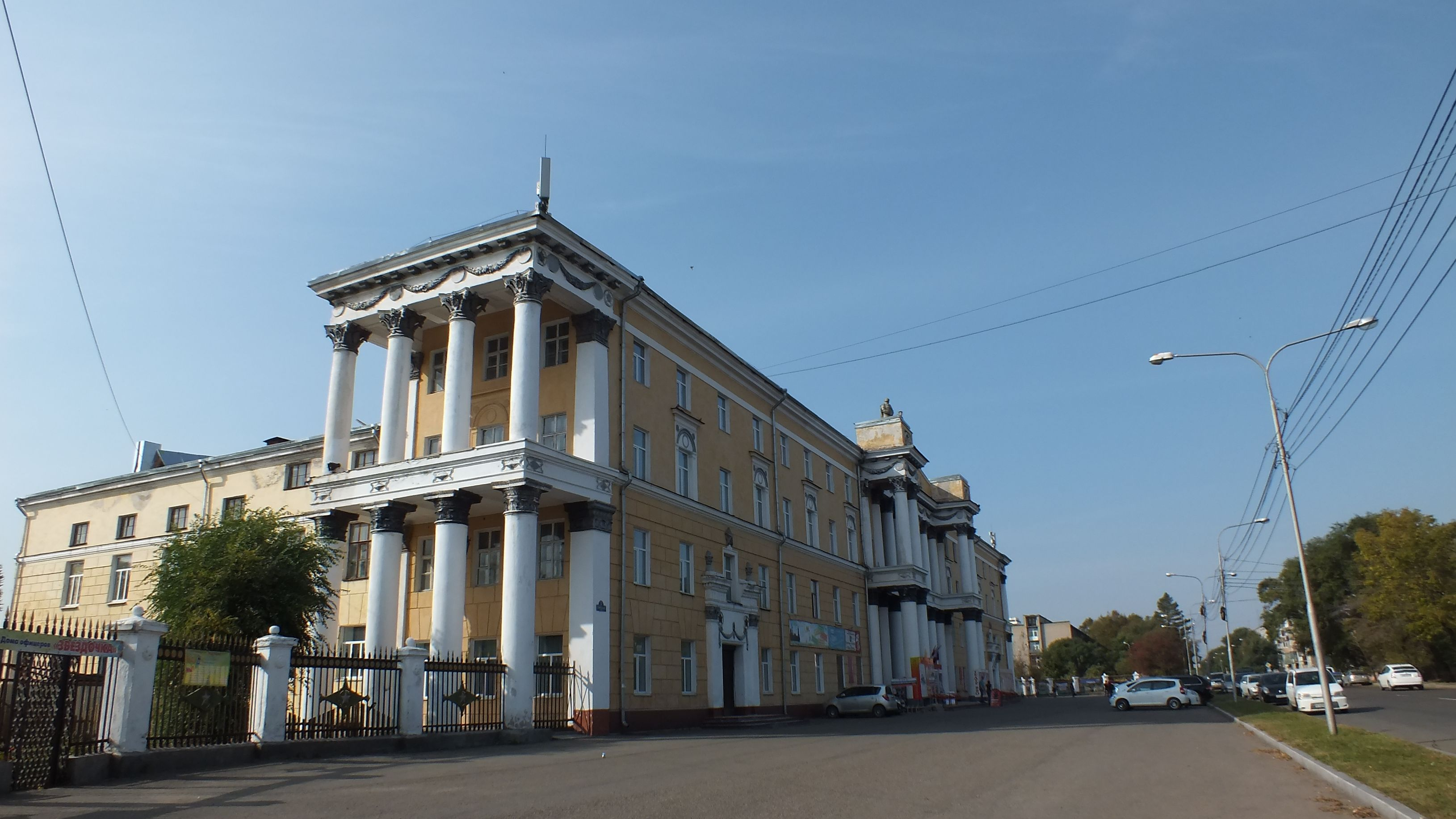 Уссурийск, Драматический театр Восточного военного округа